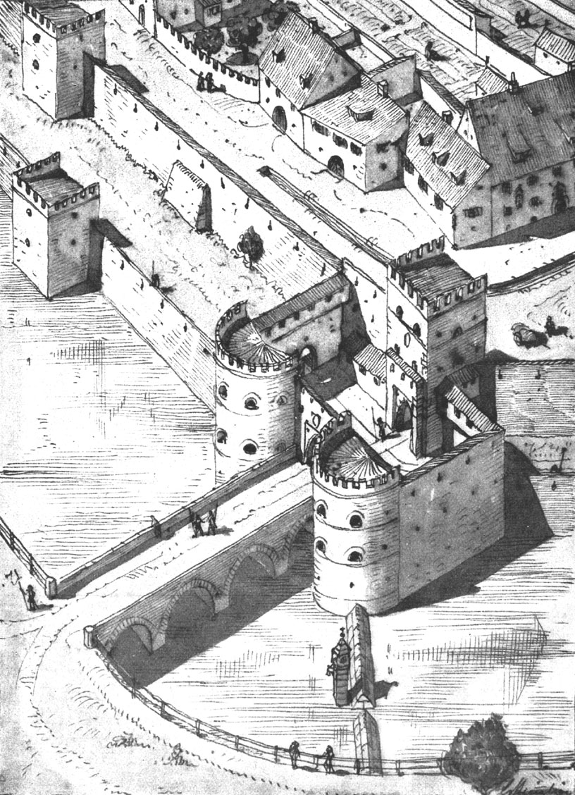 Abb. 24: Das Angertor.